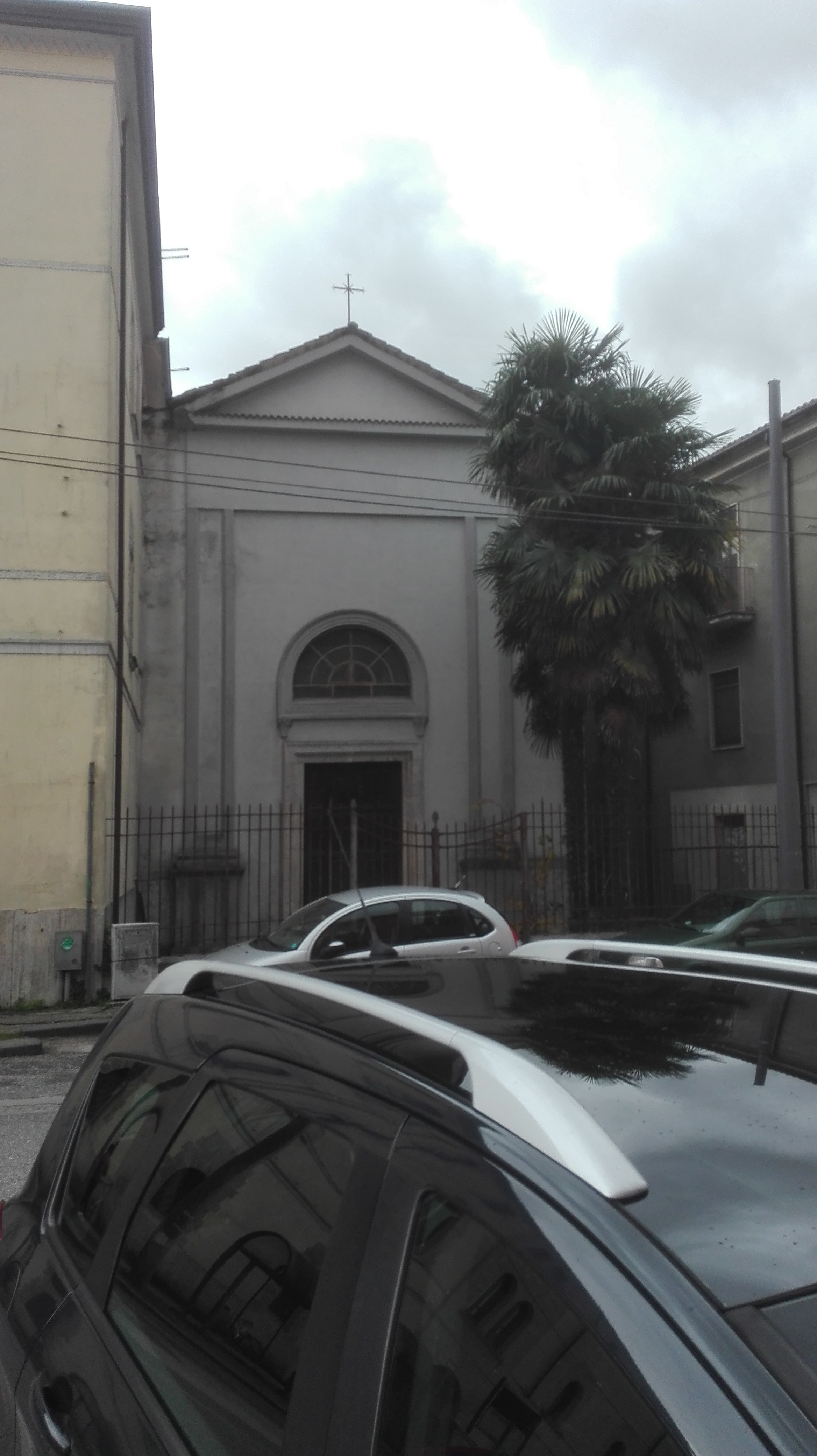 Facciata della Chiesa di San Giovanni Battista detta del Monserrato